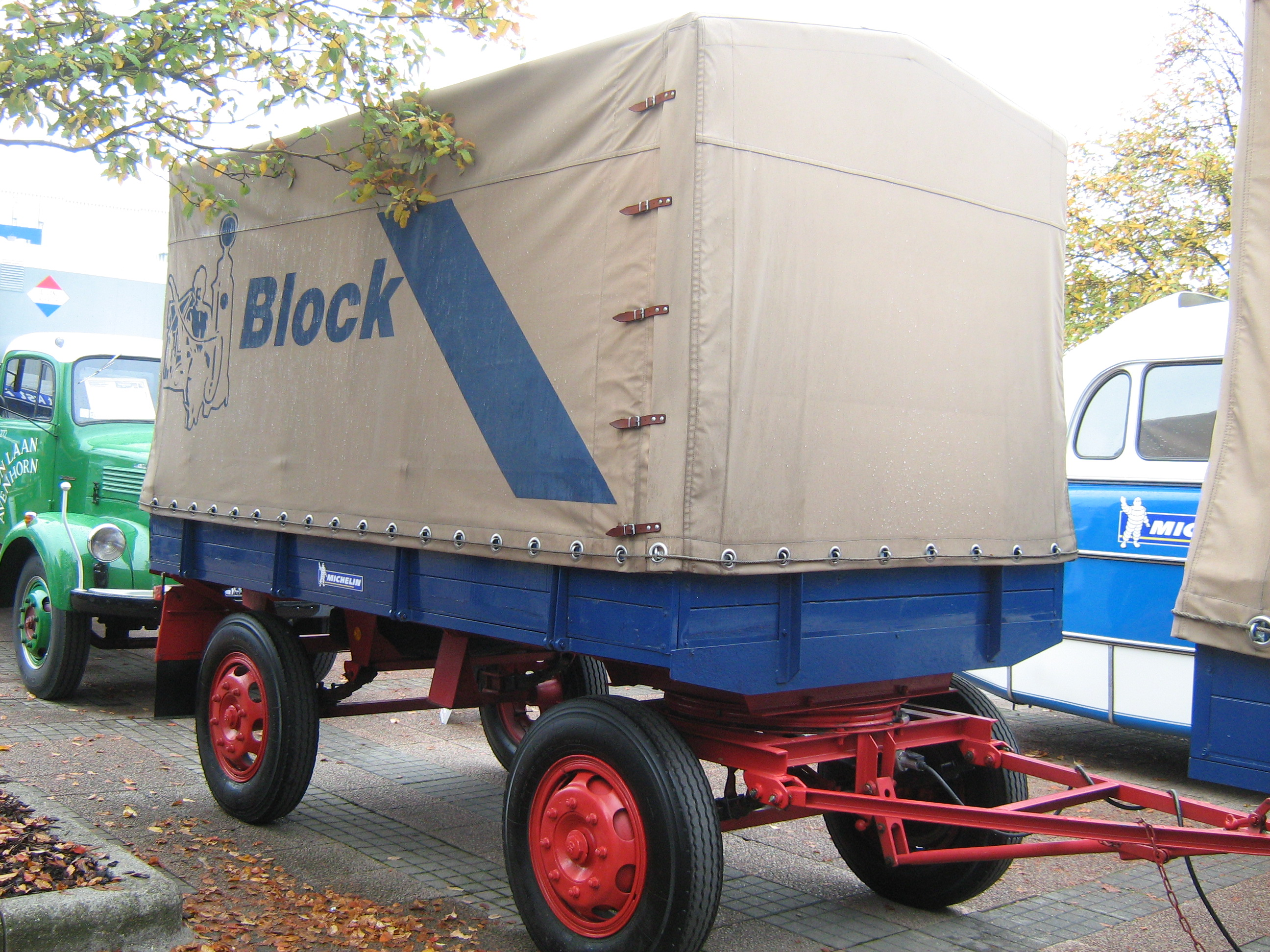 kl. Anhänger, der auch von Fernfahrern ein Spesen-Anhänger genannt wird